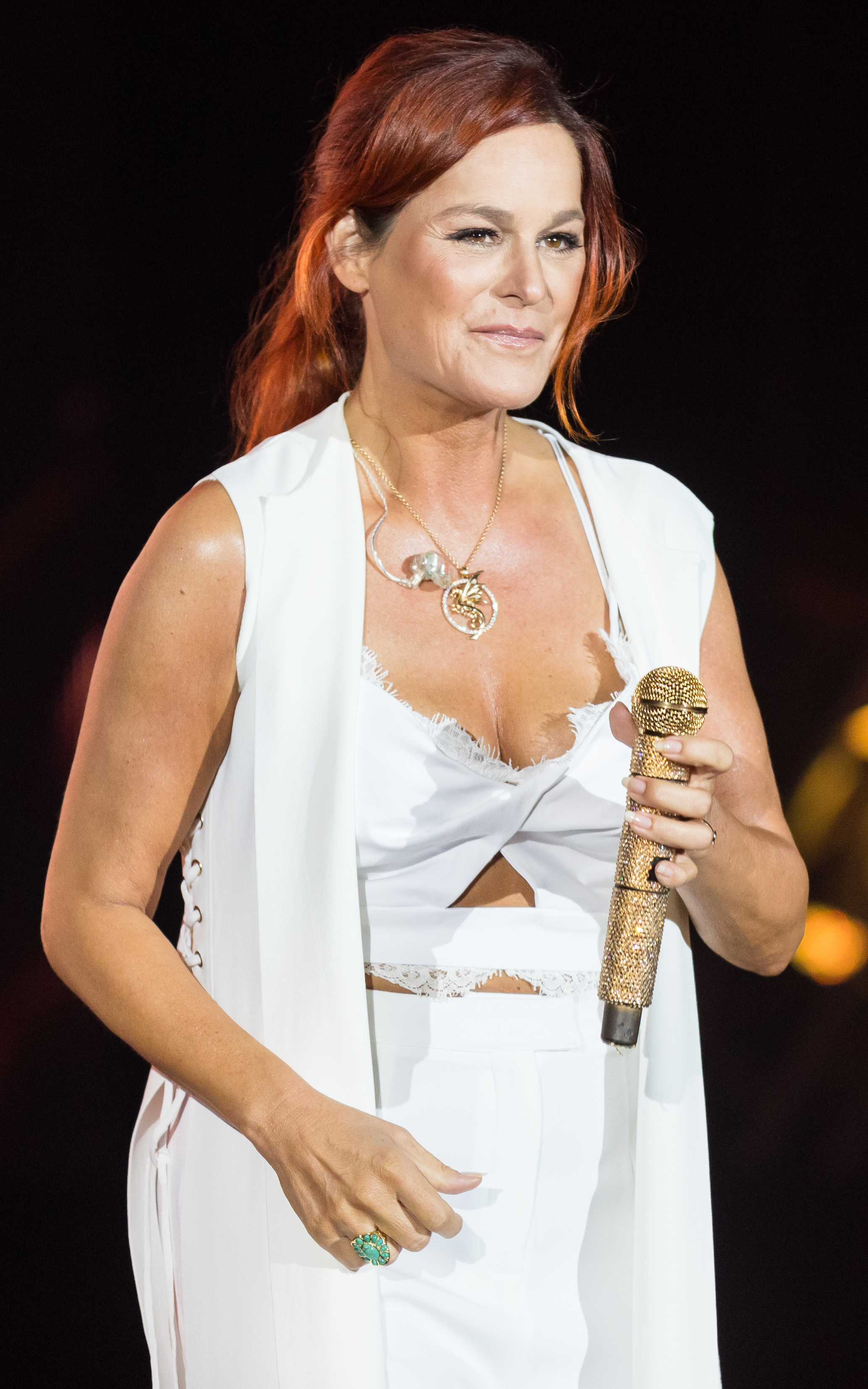 Andrea Berg during Die Schlagernacht des Jahres at Hanns-Martin-Schleyer-Halle, Stuttgart, Baden-Württemberg, Germany on 2017-10-14, Photo: Sven Mandel